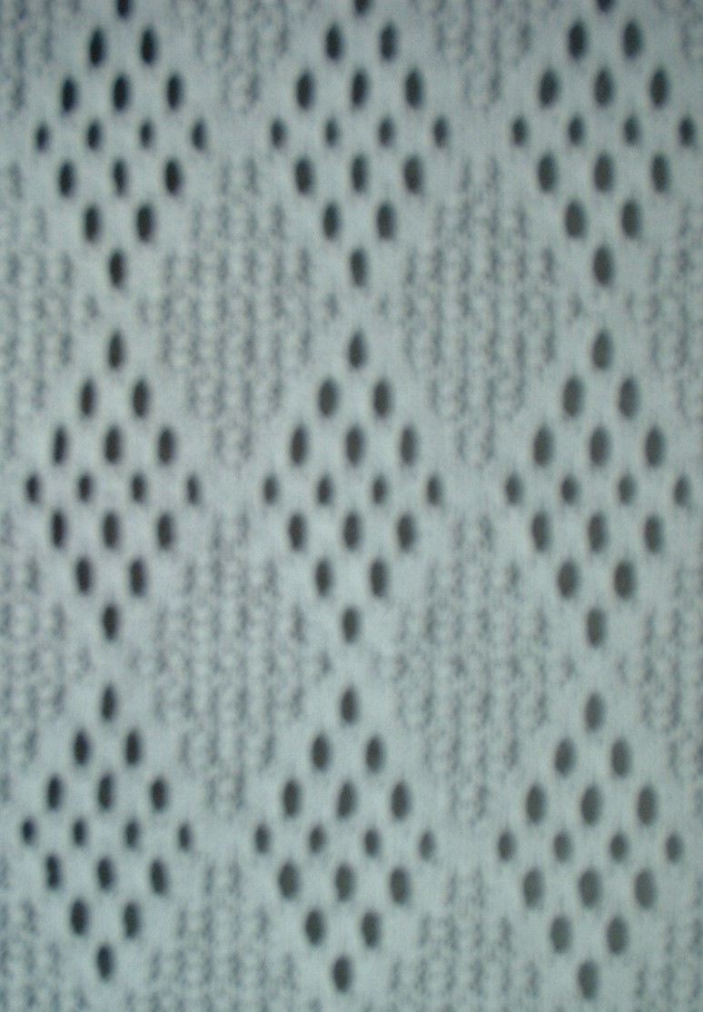 Ajour-Wirkware für Damenoberbekleidung